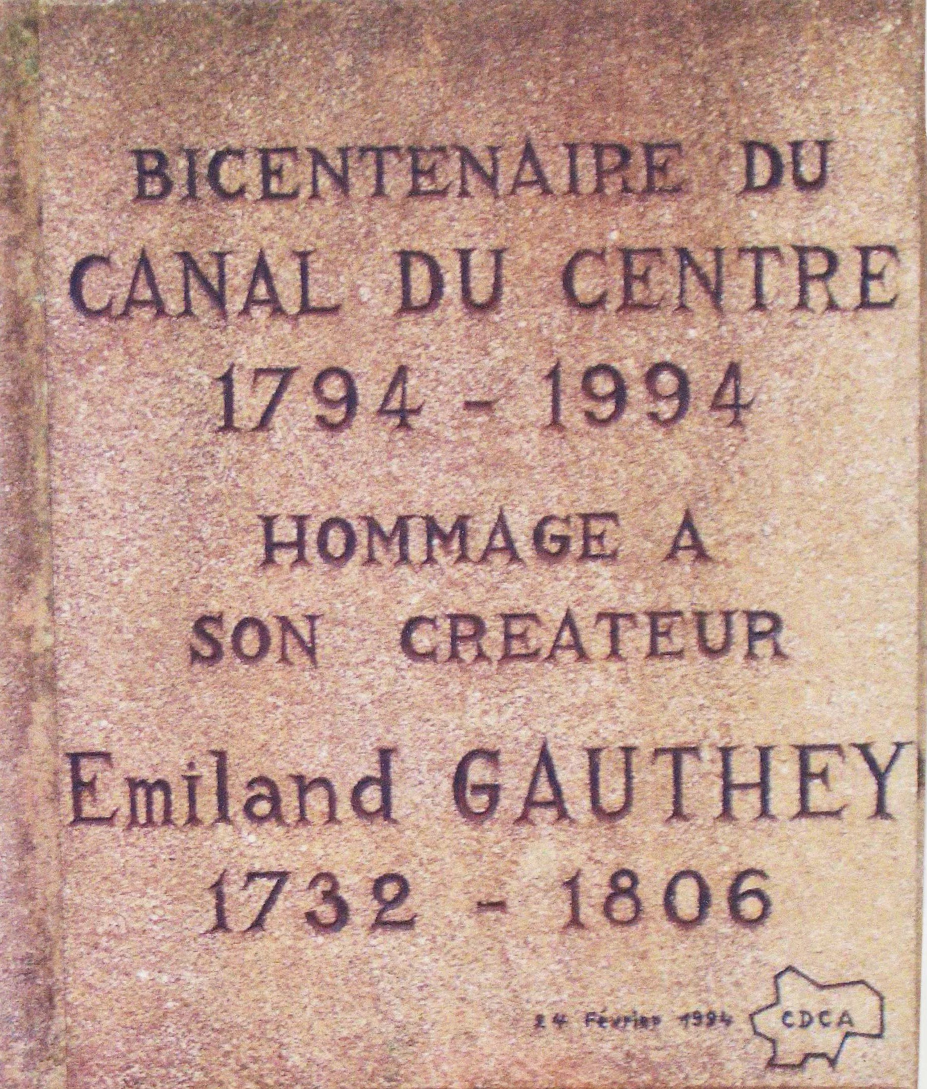 Plaque sur la stèle à Longendu